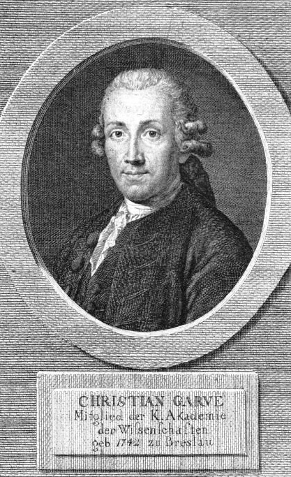 Bildnis des Philosophen Christian Garve (1742–1798), Stich von Henne nach Anton Graff